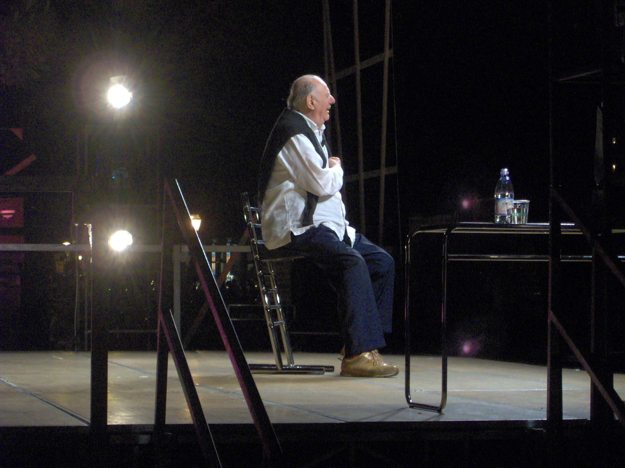 Dario Fo durante lo spettacolo al Mondomare Festival a Lerici